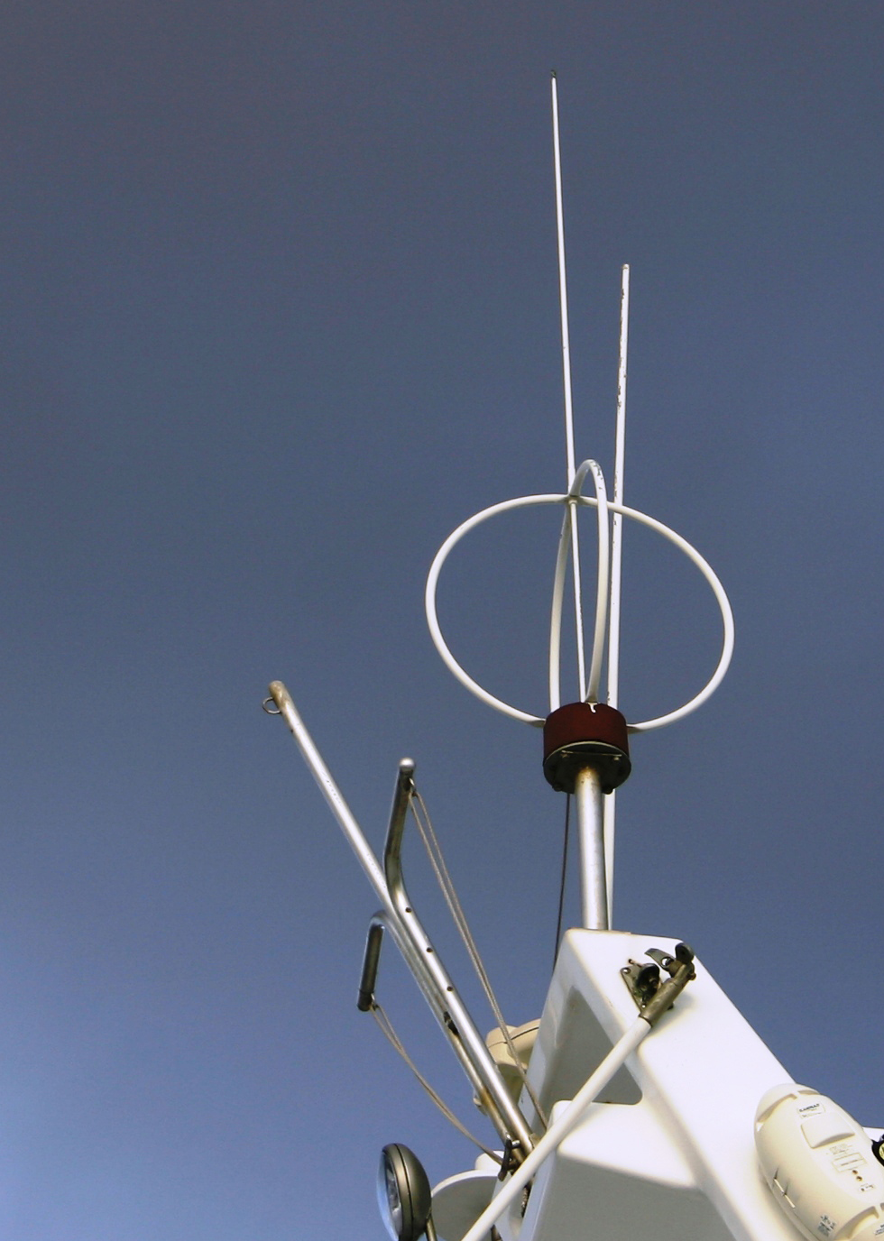 Bellini-Tosi -radiosuuntima-antenni aluksessa